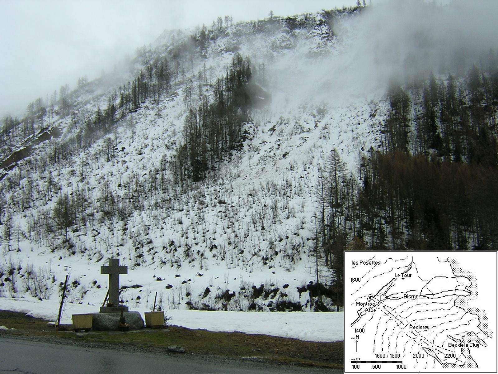 Avalanche Chamoniw 09/02/1999